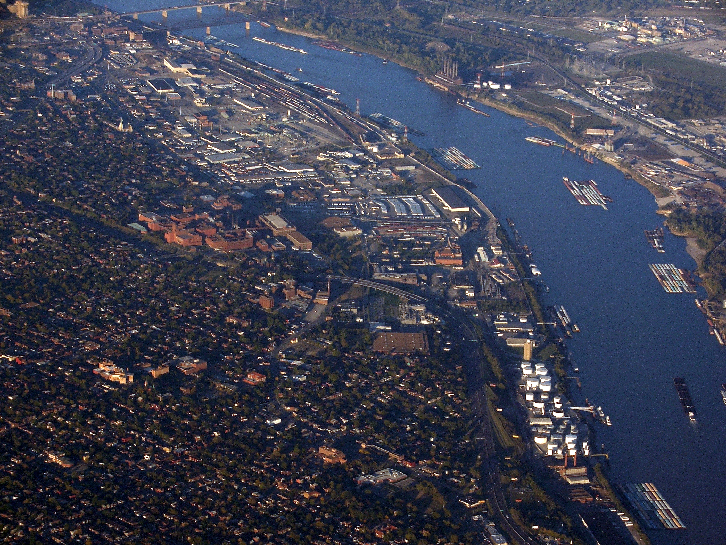 St Louis, Missouri, USA